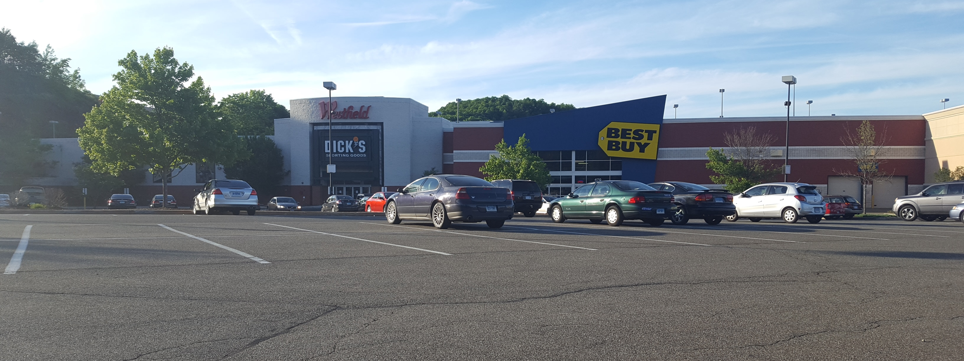 Lord & Taylor/Dicks/Best Buy - Meriden Mall Meriden, CT June 2016